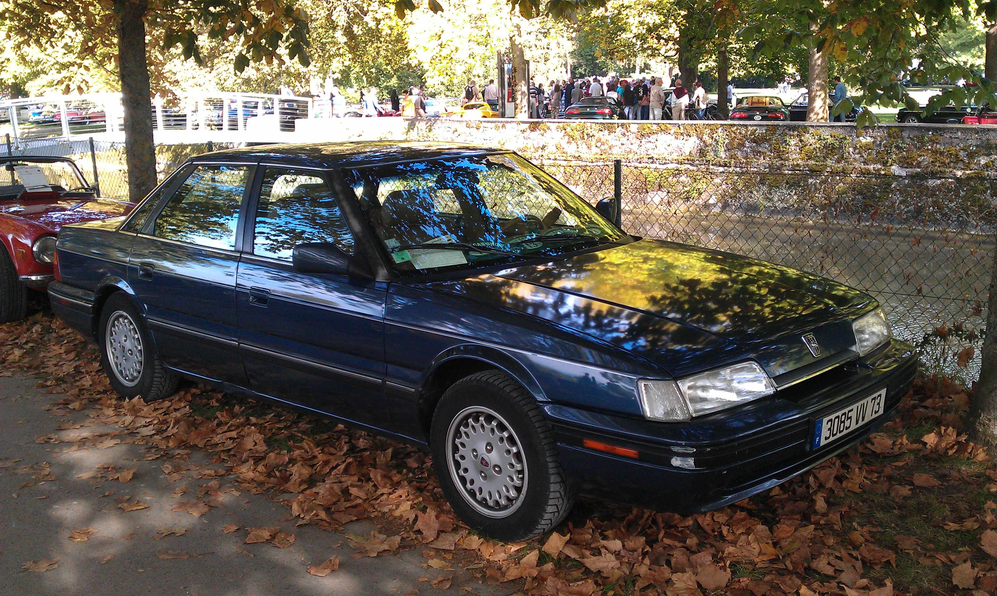 1990 Sterling 827 SL 2.7L V6